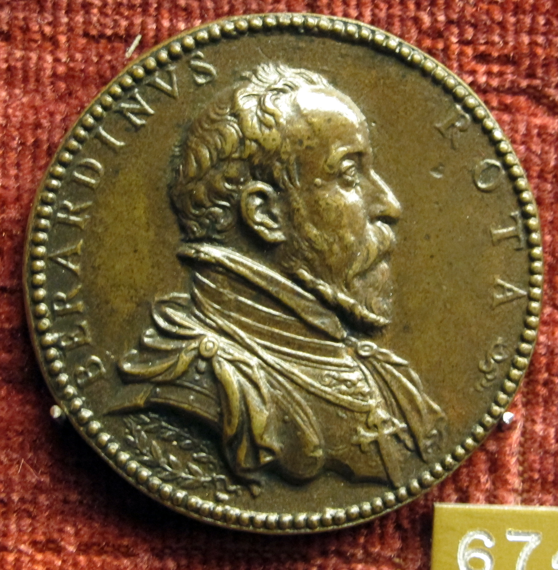 medaglia di autore anonimo